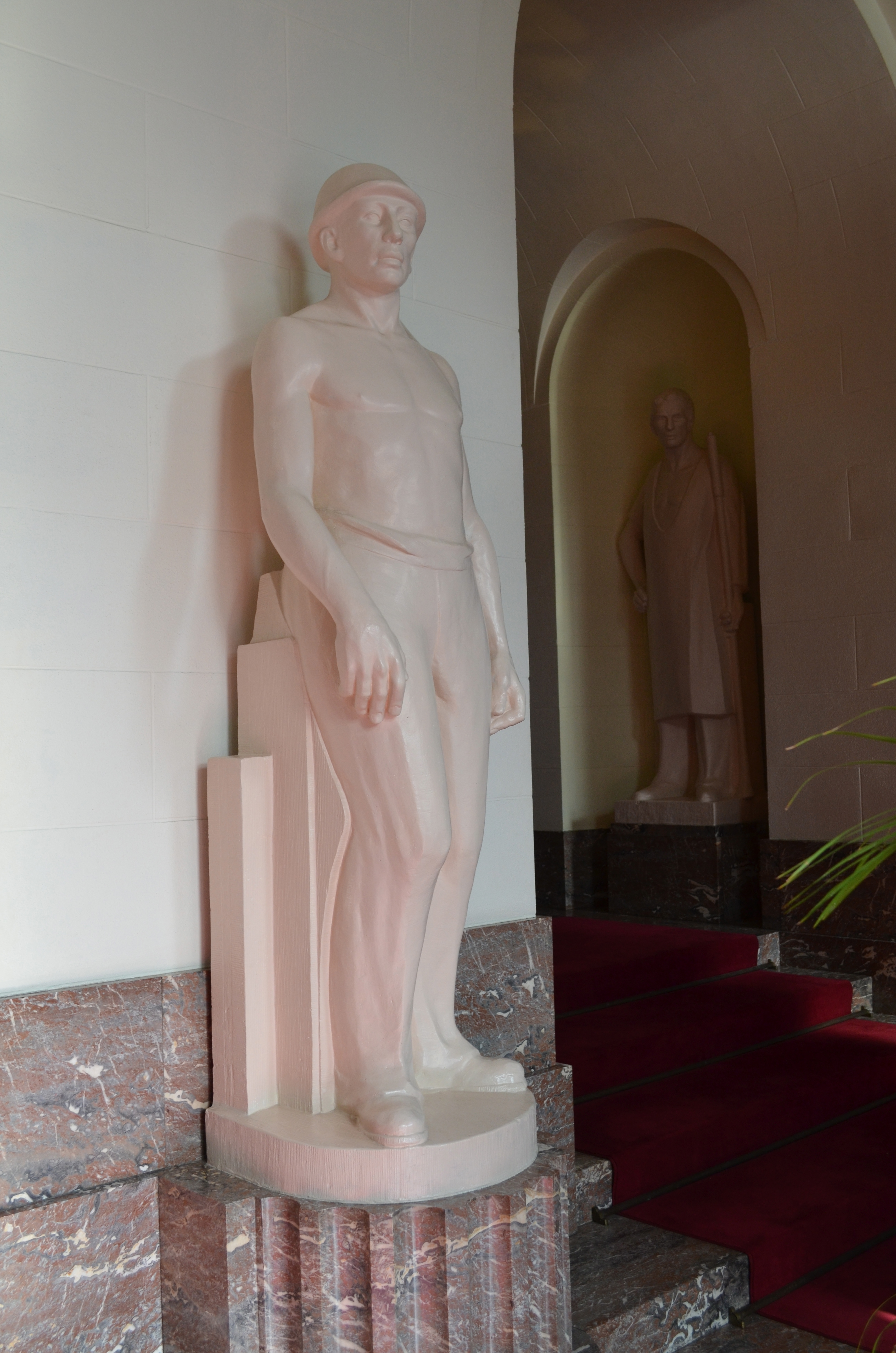 Sculpture de style Art déco